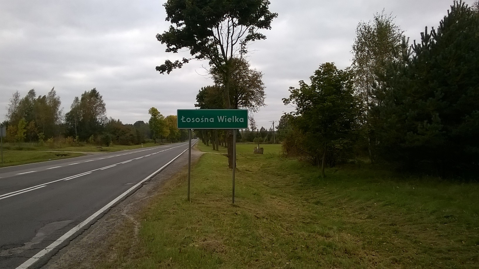 Вёска Ласосьна Велька ў Сакульскім павеце Падляшскага ваяводства Польшчы.